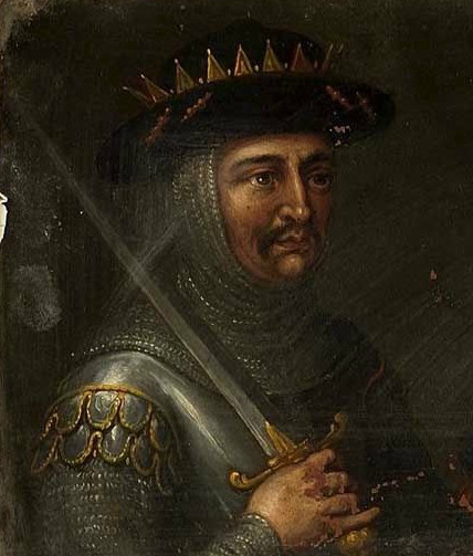 Détail d'un portrait de Godefroy II et de son épouse.